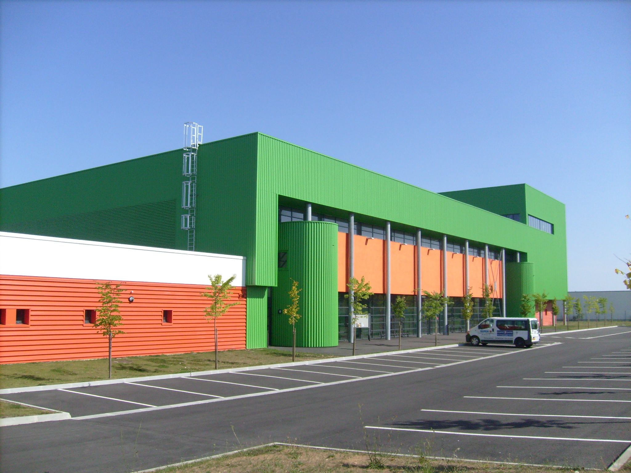 Le complexe sportif des Beauplans à Gémozac